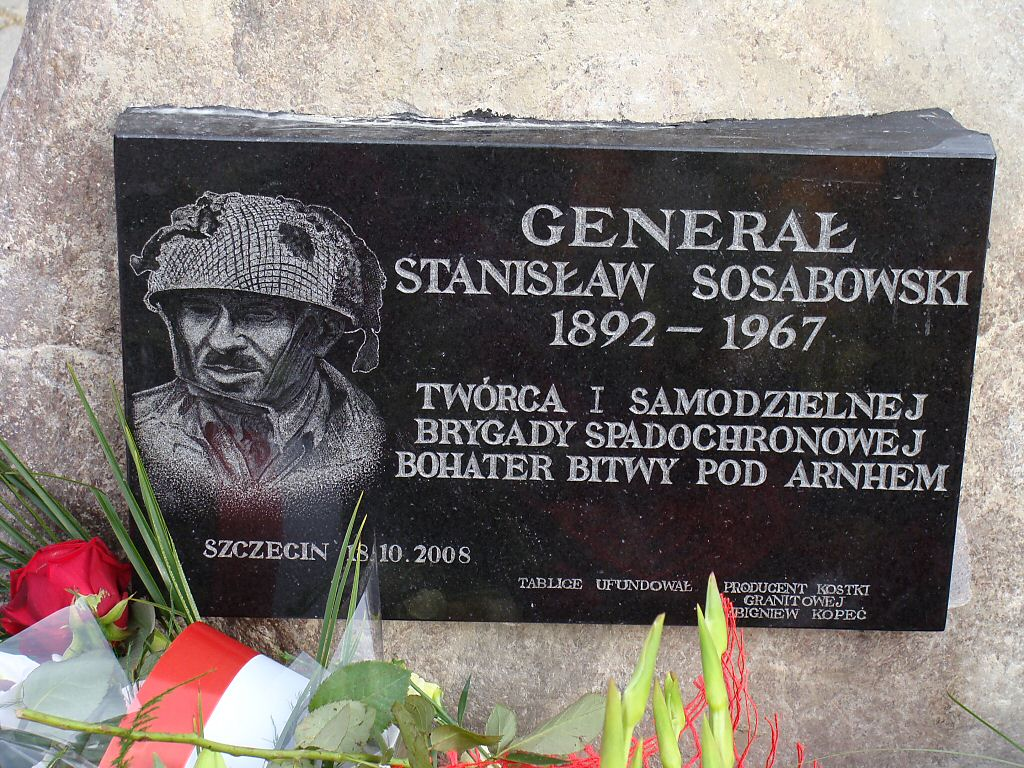 Tablica odsłonięta podczas uroczystości nadania nowej ulicy w Szczecinie imienia gen. Stanisława Sosabowskiego. Szczecin, 18.10.2008